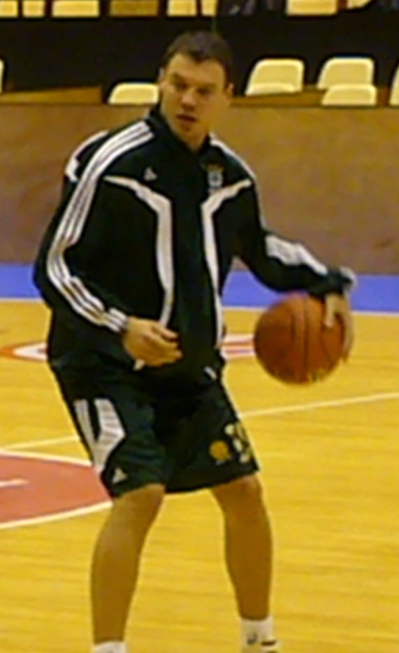 Le joueur lituanien de basket-ball Šarūnas Jasikevičius en novembre 2007 pour l'Euroleague avec le Panathinatikos(Clermont-Ferrand)